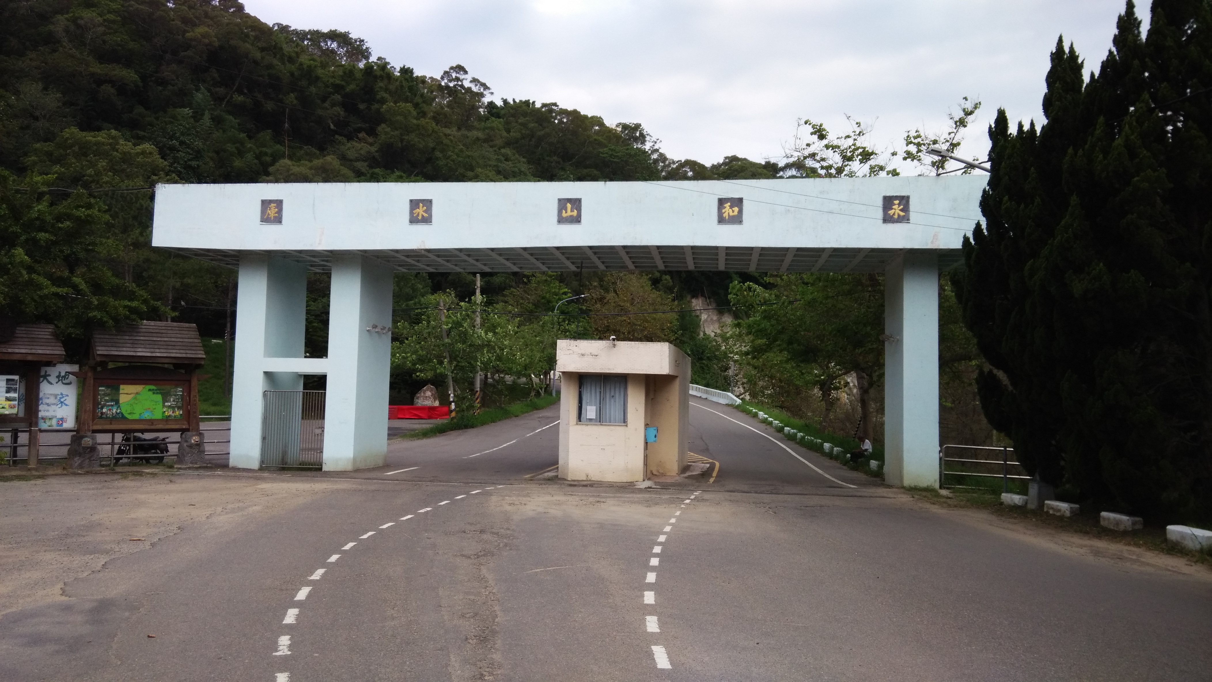 中文（台灣）: 永和山水庫一景